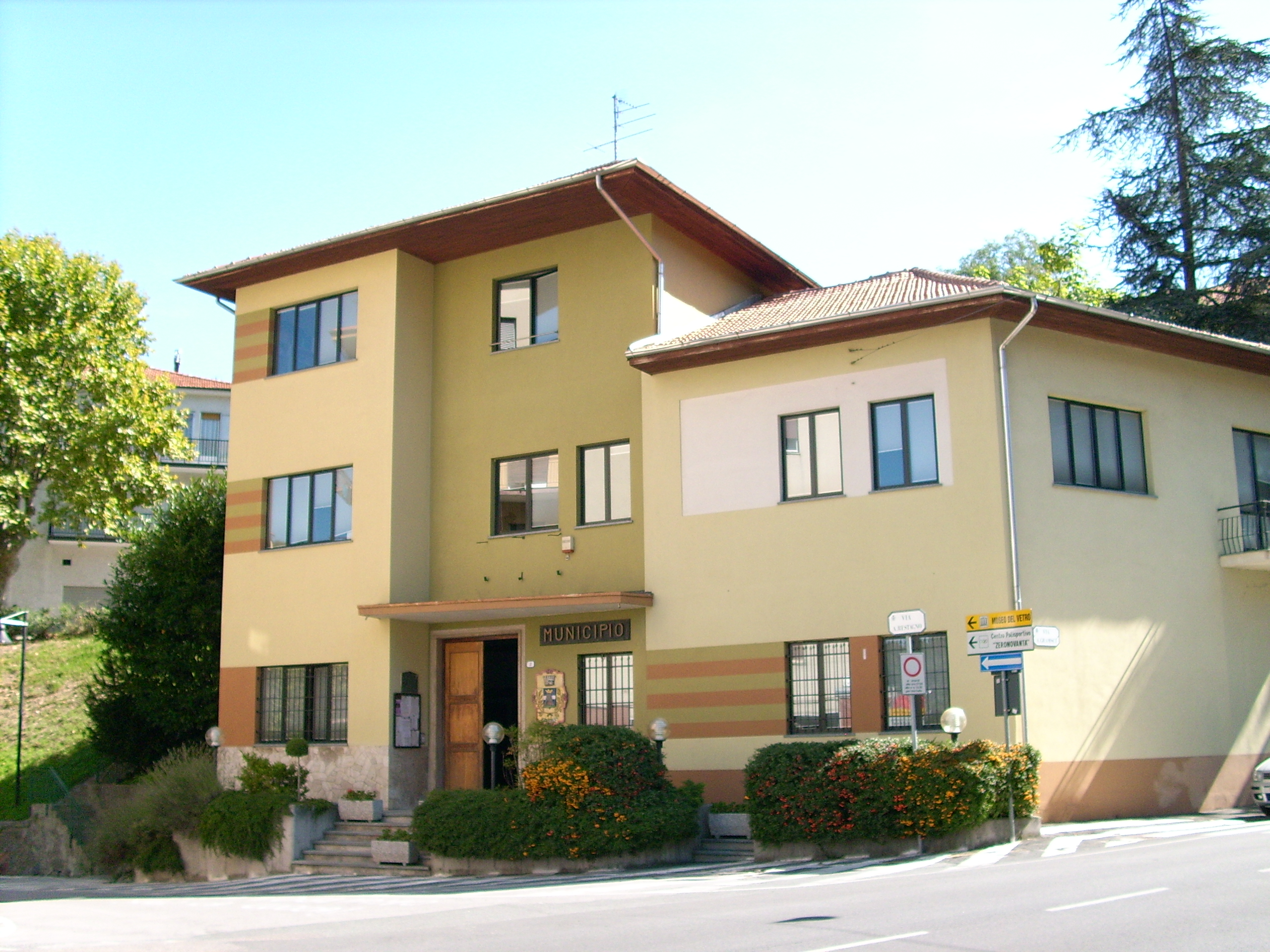 Municipio di Altare, Liguria, Italia